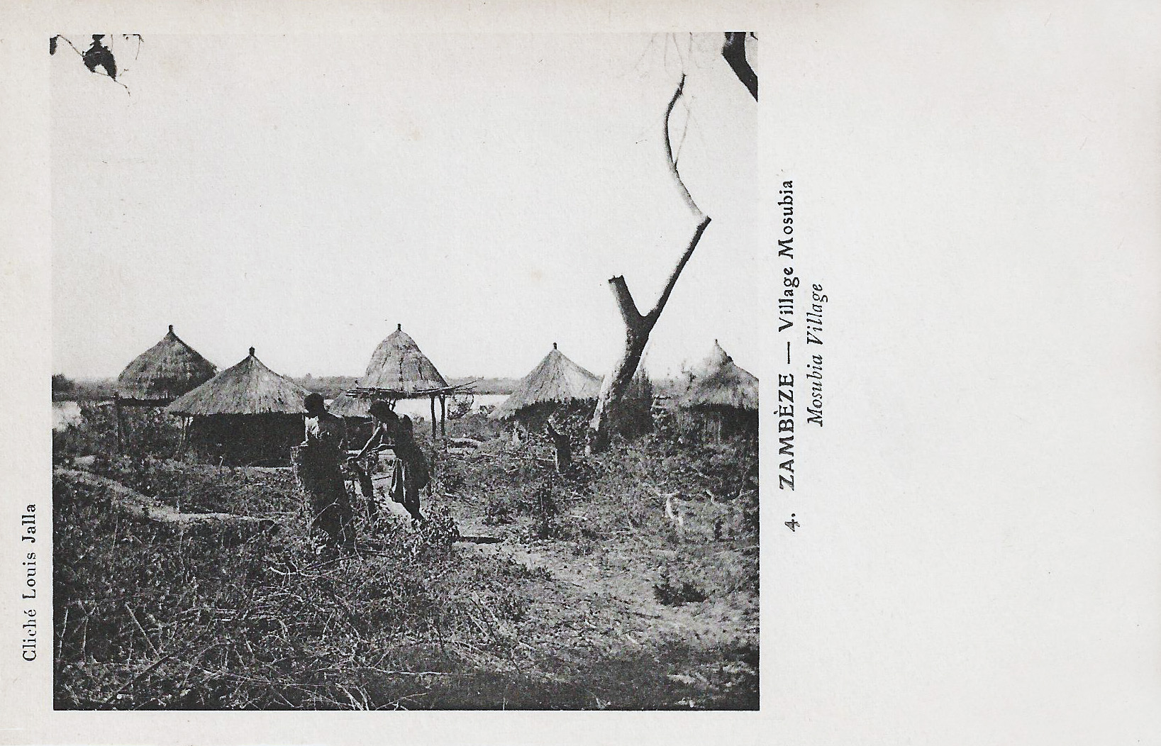 Zambèze. Village Mosubia